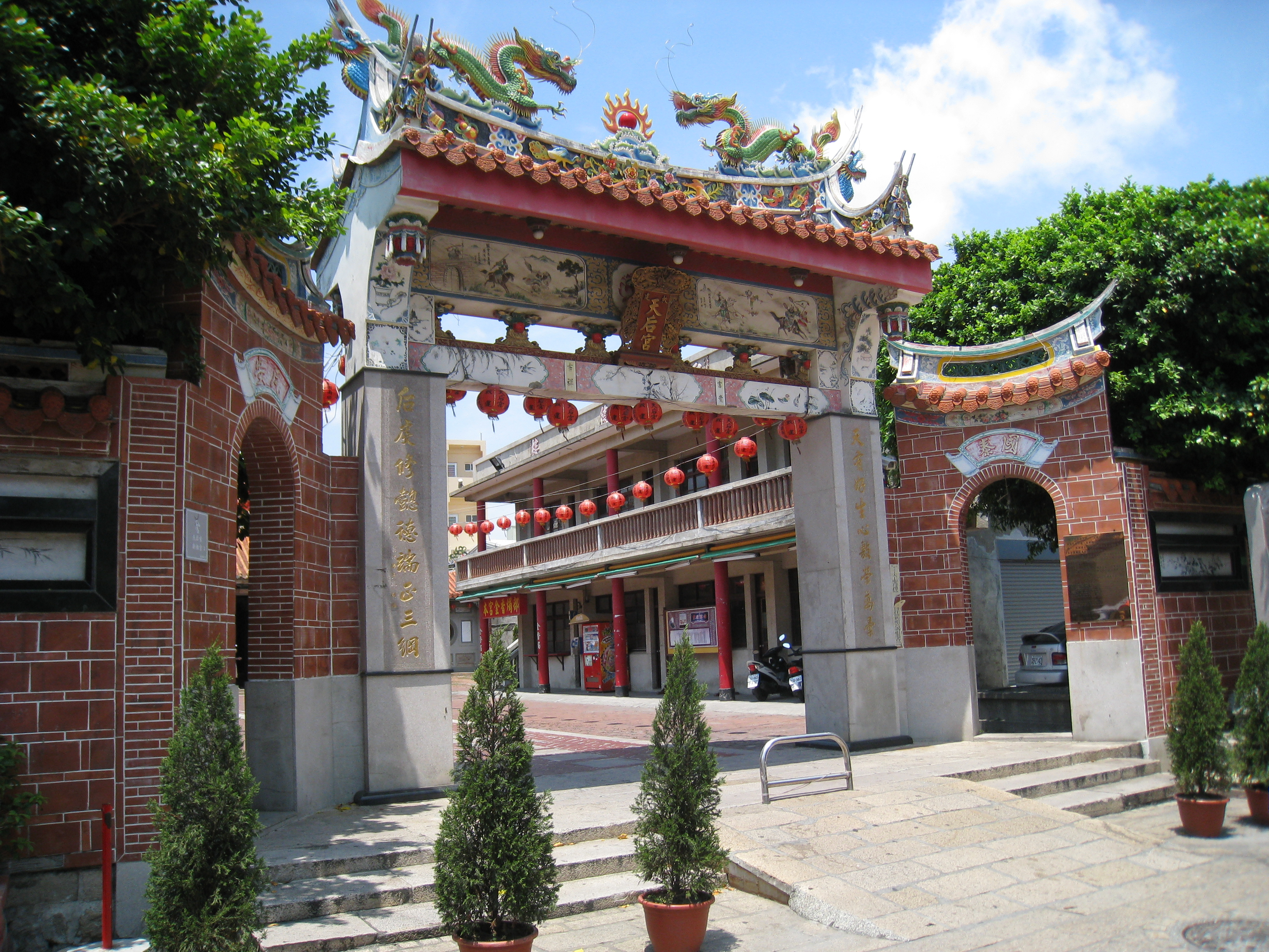 中文（台灣）: 鹿港敕建天后宮 (新祖宮)